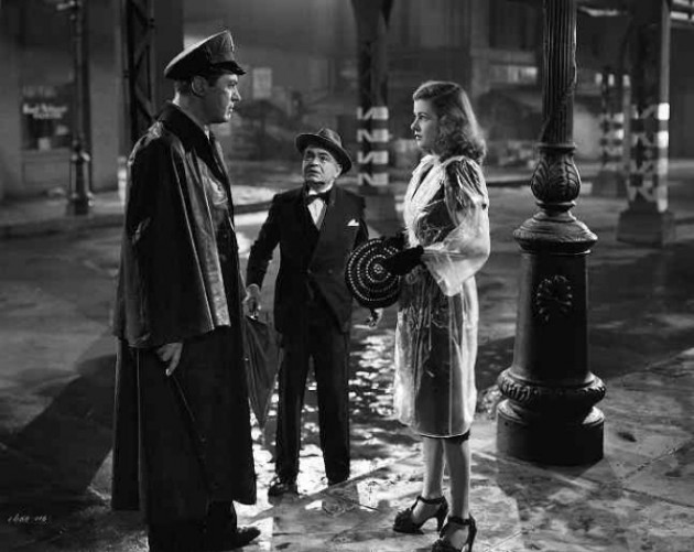 「スカーレット・ストリート」におけるエドワード・G・ロビンソンとジョーン・ベネット、警官